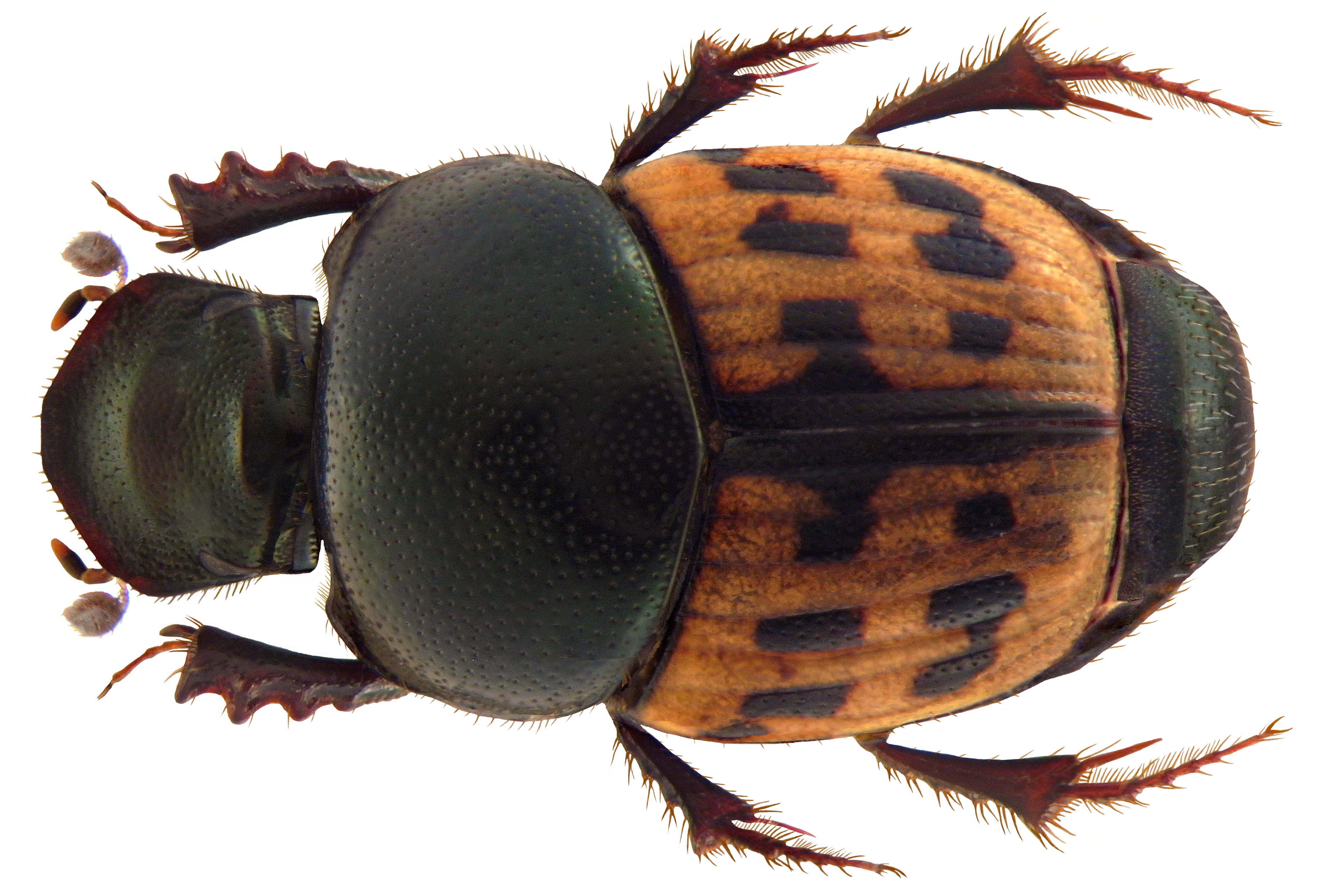 Familie: Scarabaeidae Groesse: 6,8 mm Fundort: Pakistan, Sukkur leg. G.Pilleri, 1969; det. J.Schönfeld, 2008 Photo: U.Schmidt, 2010